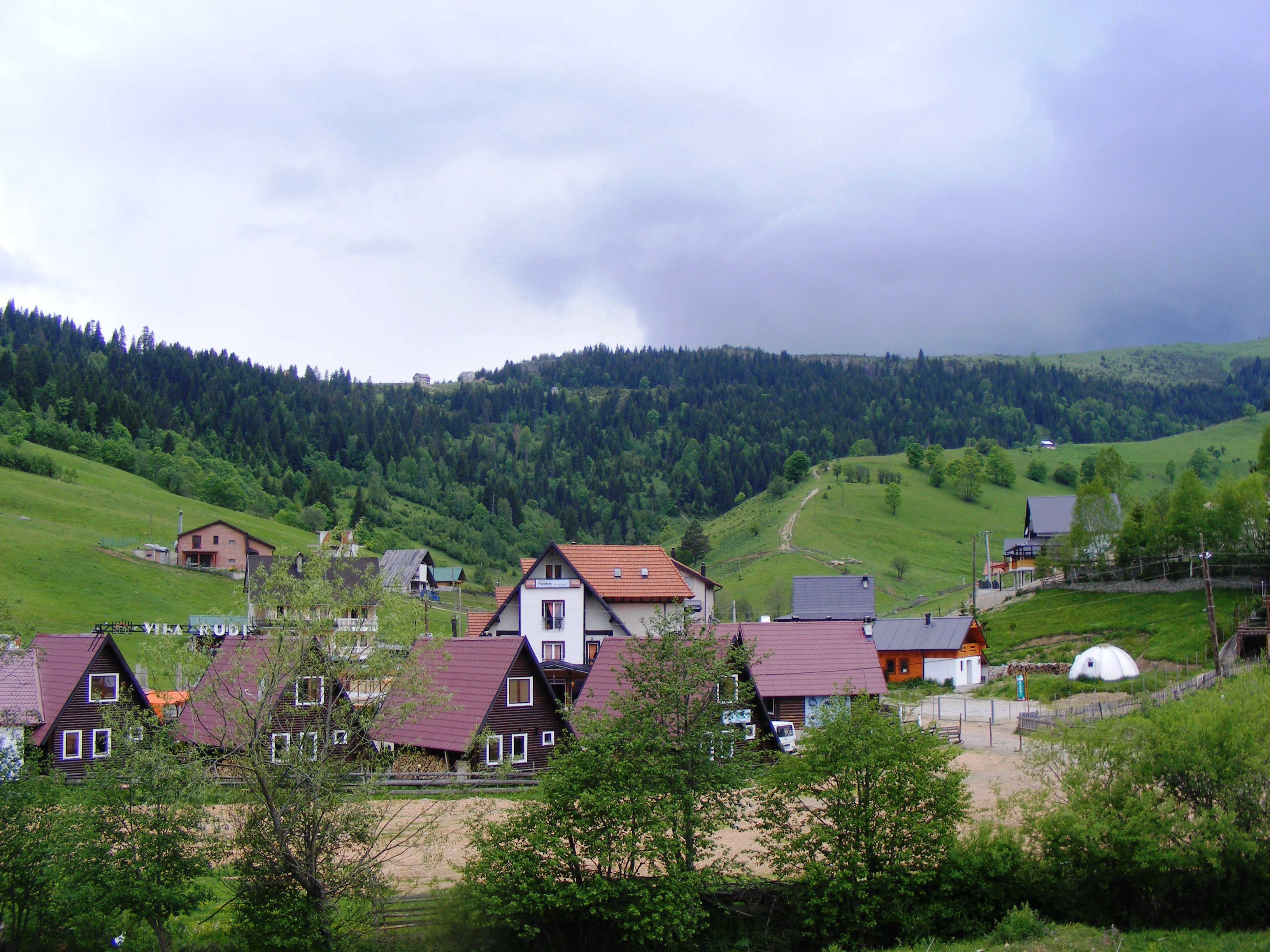 Parku Kombëtar Bjeshkët Nemuna, Pejë, Deçan, Istog, Junik, Gjakovë